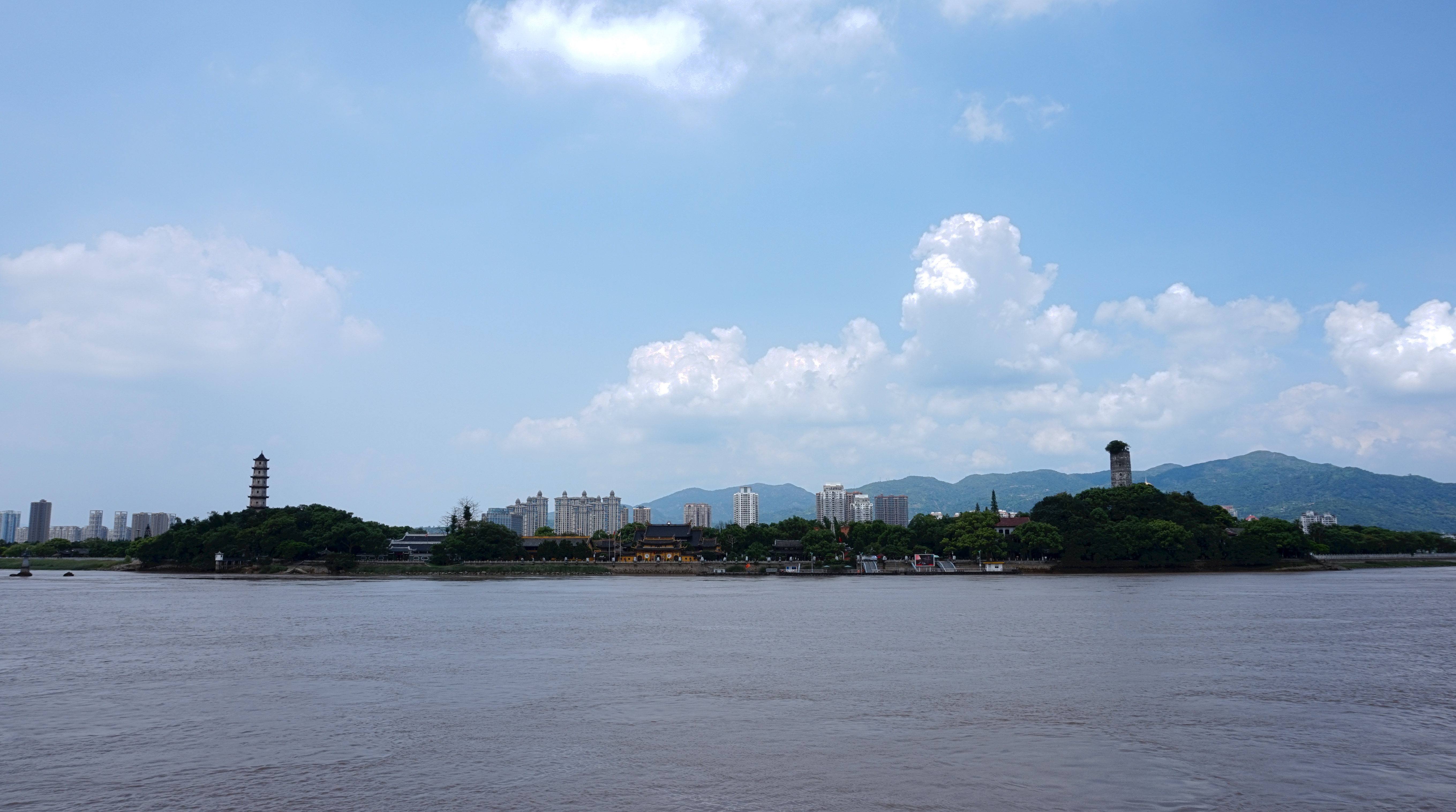 温州江心屿。